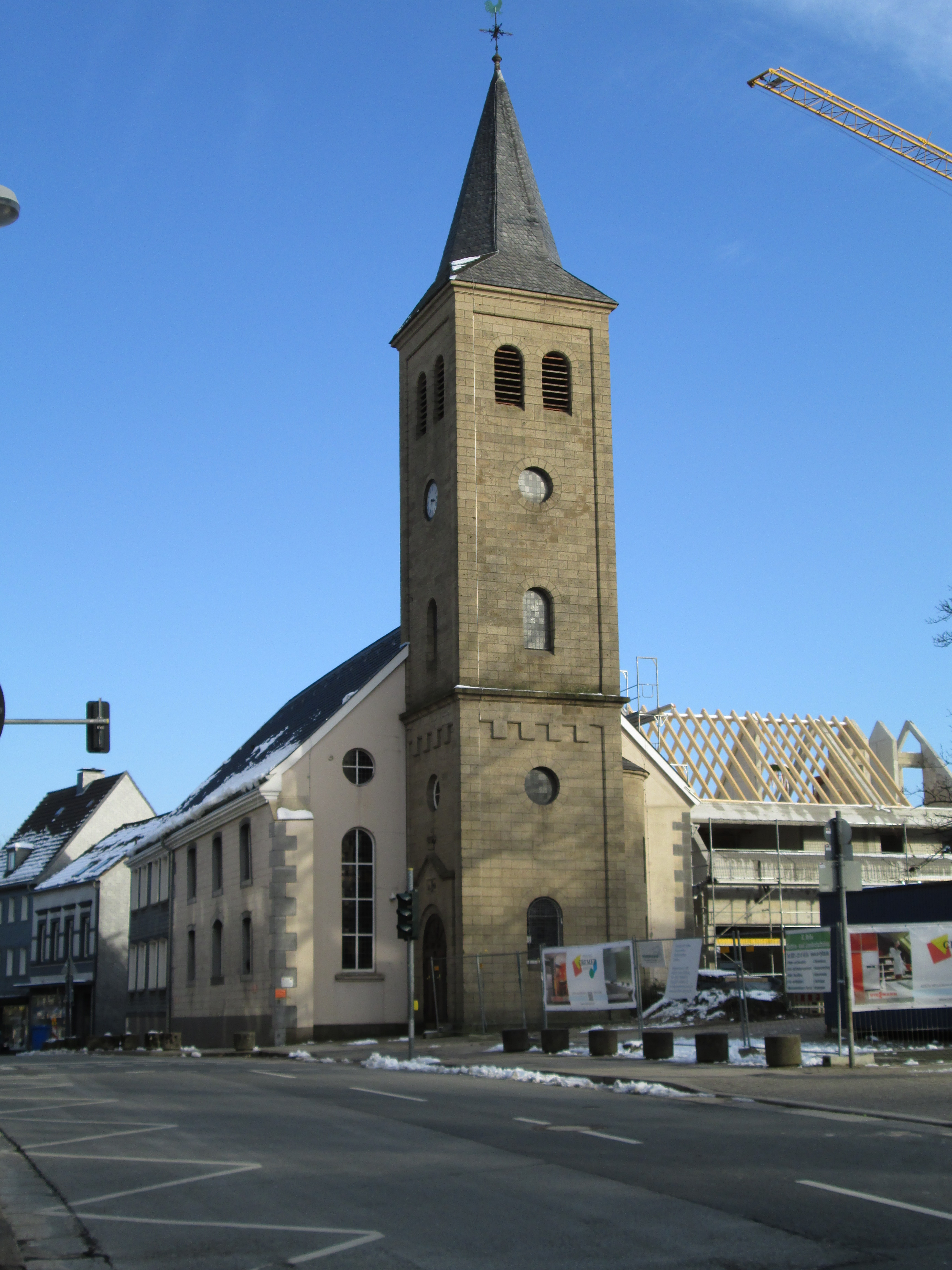 Die evangelische „Alte Kirche“ in Heiligenhaus, Hauptstr. 206 This is a photograph of an architectural monument.